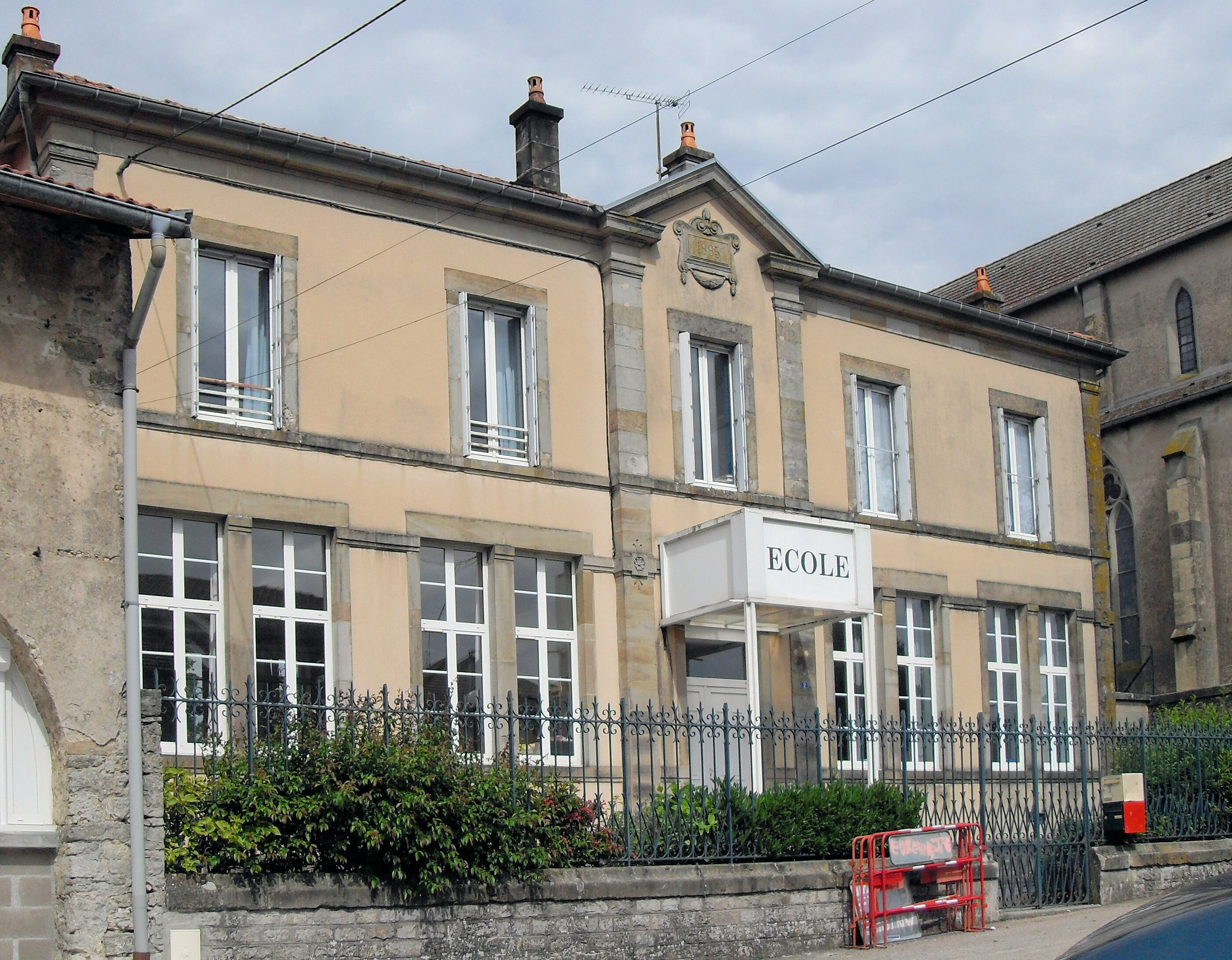 L'école de Moriville